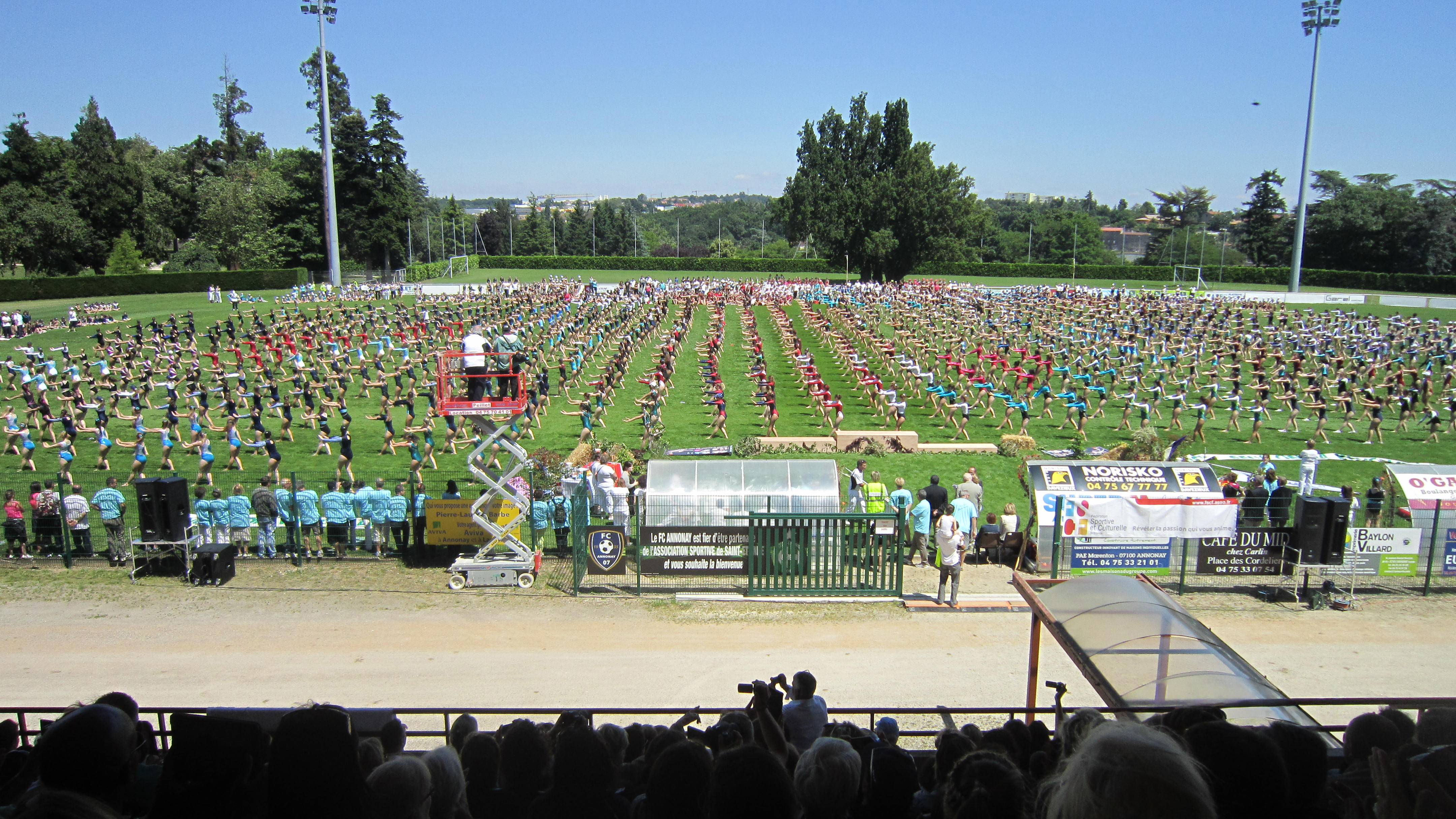 Stade avec des gymnastes